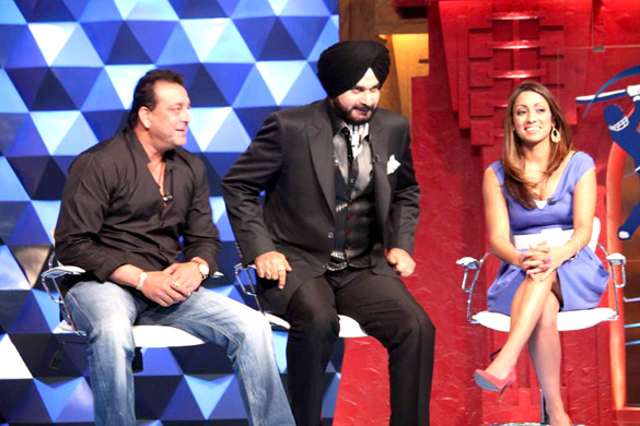 Sanjay Dutt,Navjot Singh Siddhu, Isa Guha on DLF IPL Extraaa Innings show